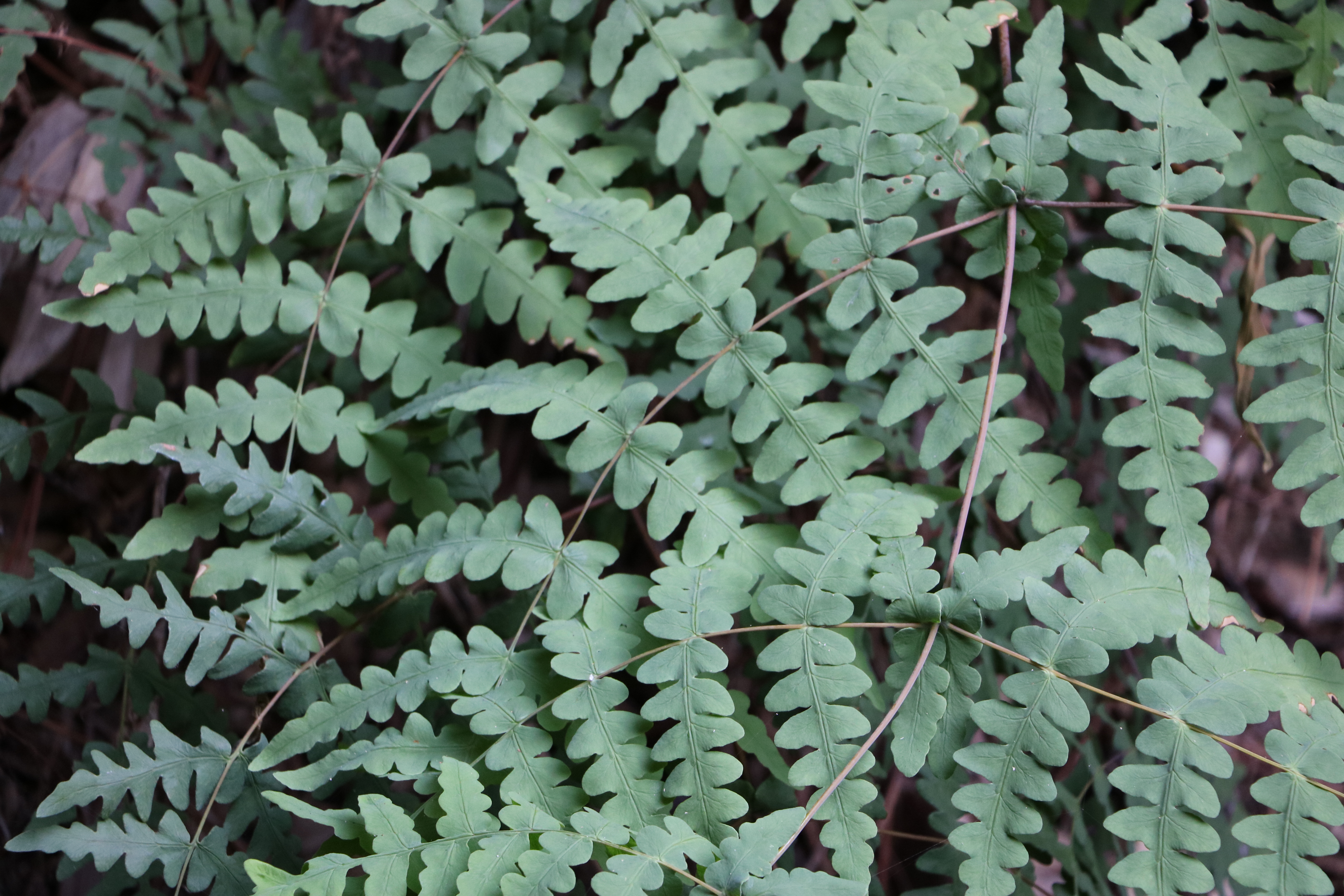 国指定天然記念物ユノミネシダ自生地（和歌山県田辺市本宮町湯の峰温泉）